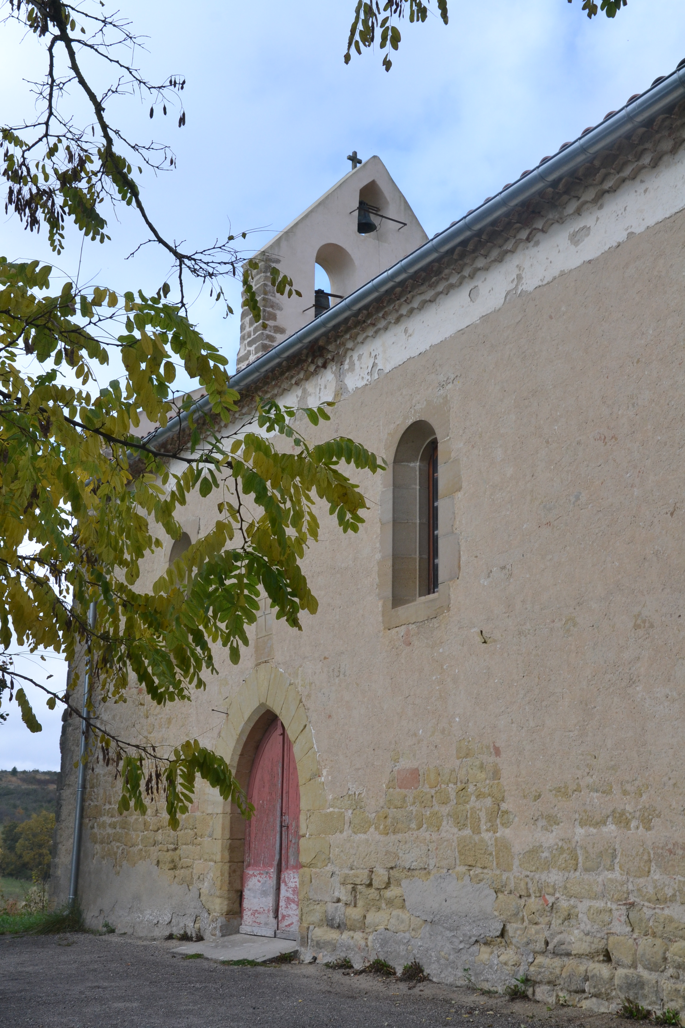 L'église de l'Invention-de-Saint-Etienne de Seignalens (Aude, France).